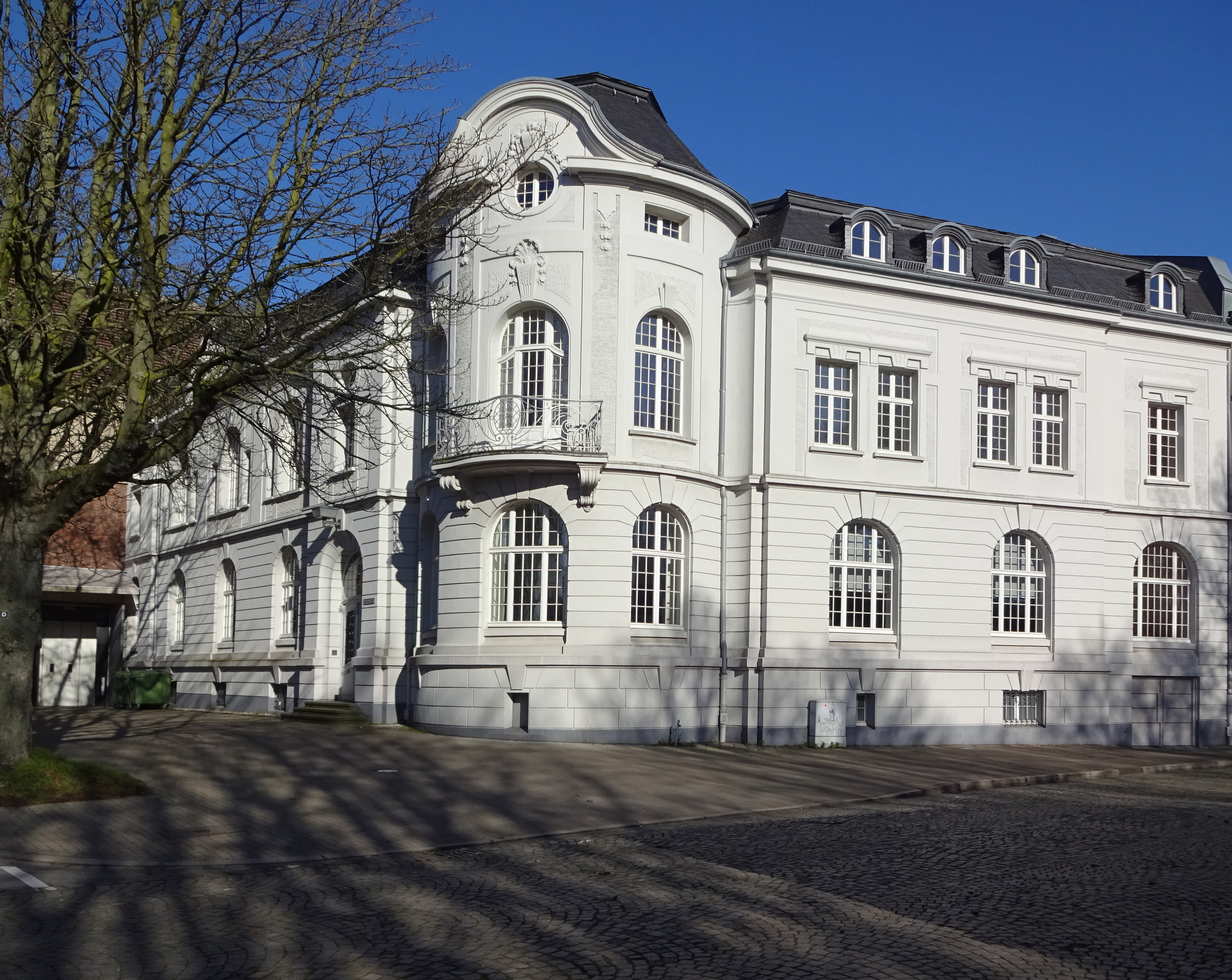 Ehrenhof 3, Düsseldorf-Pempelfort. Seit 2002 Sitz der E.ON Academy in Düsseldorf, gegründet 2001